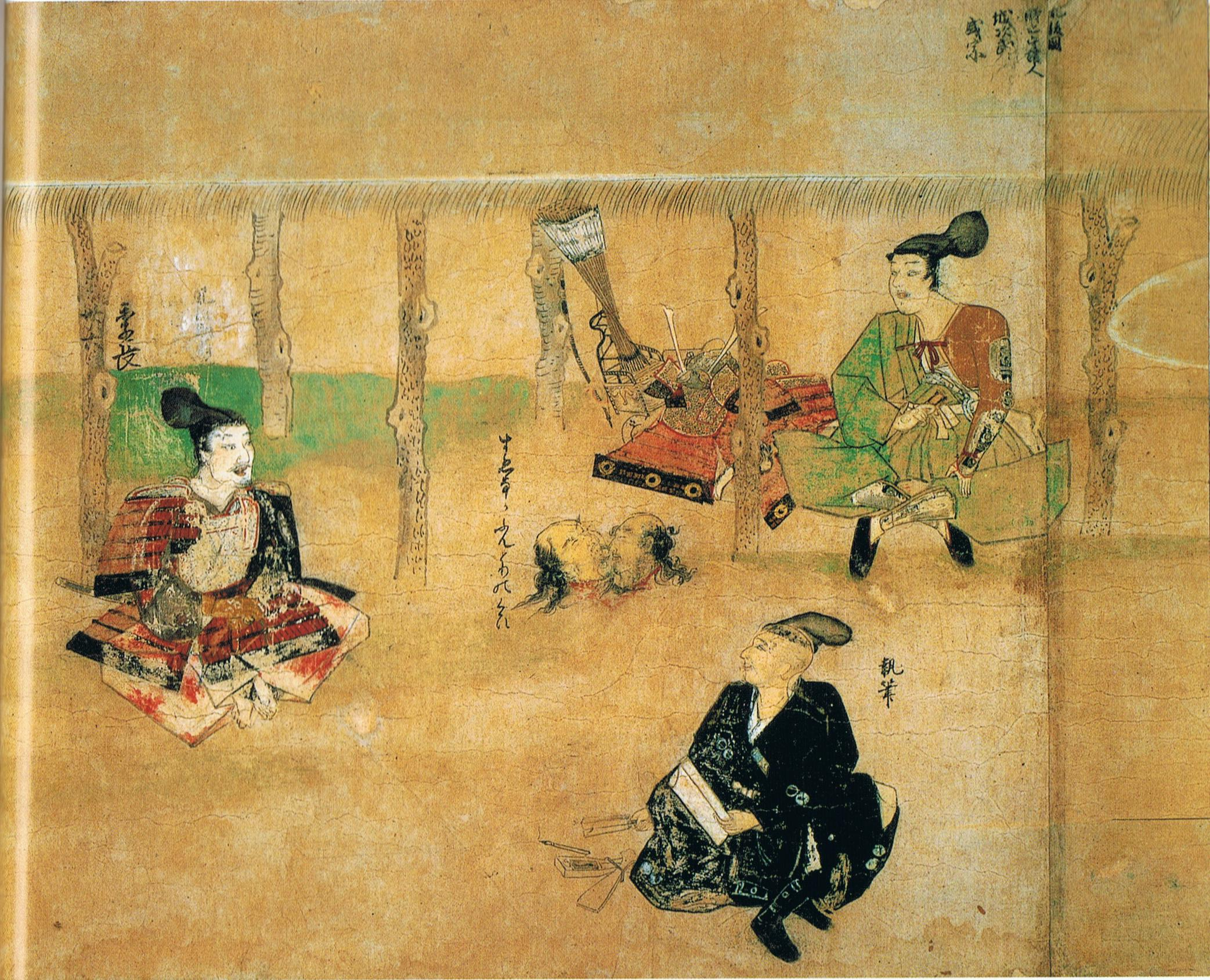 『蒙古襲来絵詞』後巻 絵二十一 【弘安の役】肥後国守護の安達盛宗に、自身の勲功を報告する竹崎季長